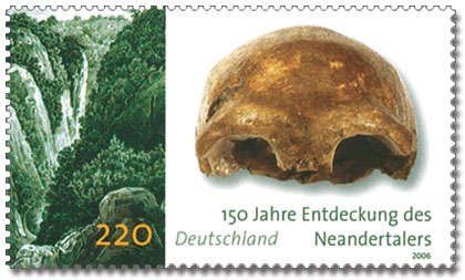 Bildbeschreibung: Das Bild zeigt die Sondermarke "150 Jahre Entdeckung des Neandertalers" der Deutschen Post, herausgegeben 10.August 2006 aus Anlass des 150. Jahrestages der Entdeckung. Quelle: Deutsche Post - Philatelie Entwurf: Annegret Ehmke, München Motiv: Stich des Neandertales und Kalotte © Rheinisches LandesMuseum Bonn Wert: 2,20 Euro Druck: Mehrfarben-Offsetdruck der Giesecke & Devrient GmbH, Werk Wertpapierdruckerei Leipzig Größe: 46,00 x 27,32 mm Papier: Gestrichenes, weißes, fluoreszierendes Postwertzeichenpapier DP 2 Ausgabetag: 10. August 2006 Upload: --Darkstar1970 00:33, 24 August 2007 (UTC) Datum: 24.08.2007